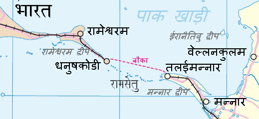 Map of hi:en:Adam's Bridge, hi:India/hi:Sri Lanka